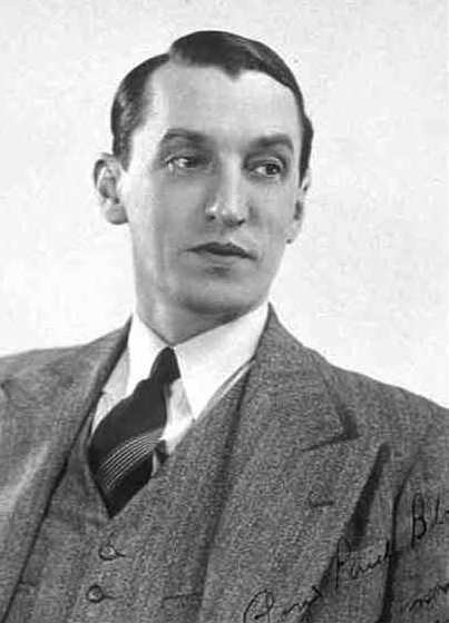 Lionel Daunais